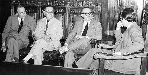 El candidato a presidente de la Nación, Arturo Frondizi, junto a su compañero de fórmula, Alejandro Gómez, acompañado del candidato a gobernador de Tucumán, por la Unión Cívica Radical Intransigente, Celestino Gelsi, visitan el diario "La Gaceta".